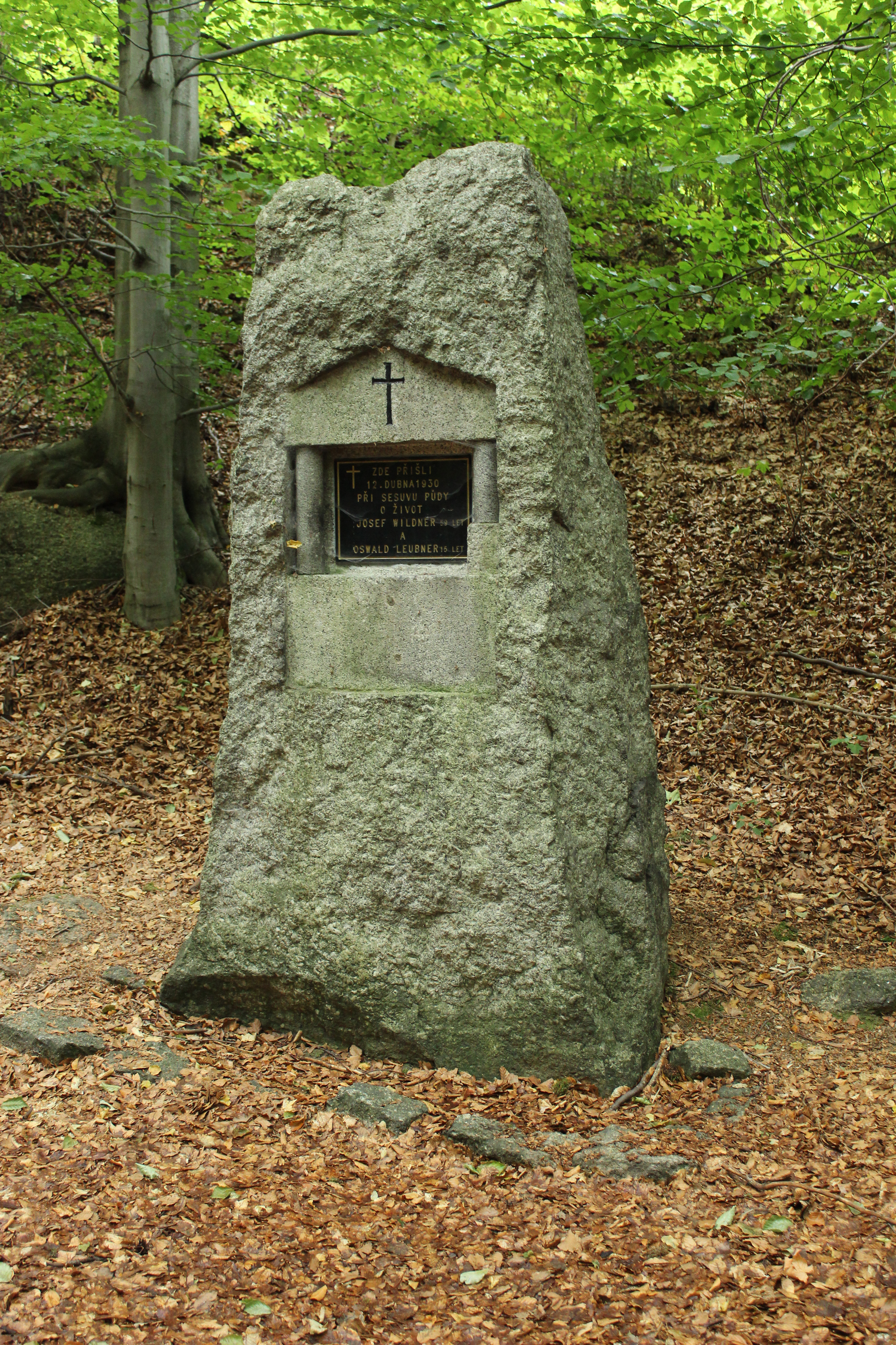 Wildnerův a Leubnerův pomník ve strži na úpatí vrchu Na Chatkách upomíná na dva muže (Josefa Wildnera a Oswalda Leubnera), které zde 12. dubna 1930 zasypal sesuv půdy.